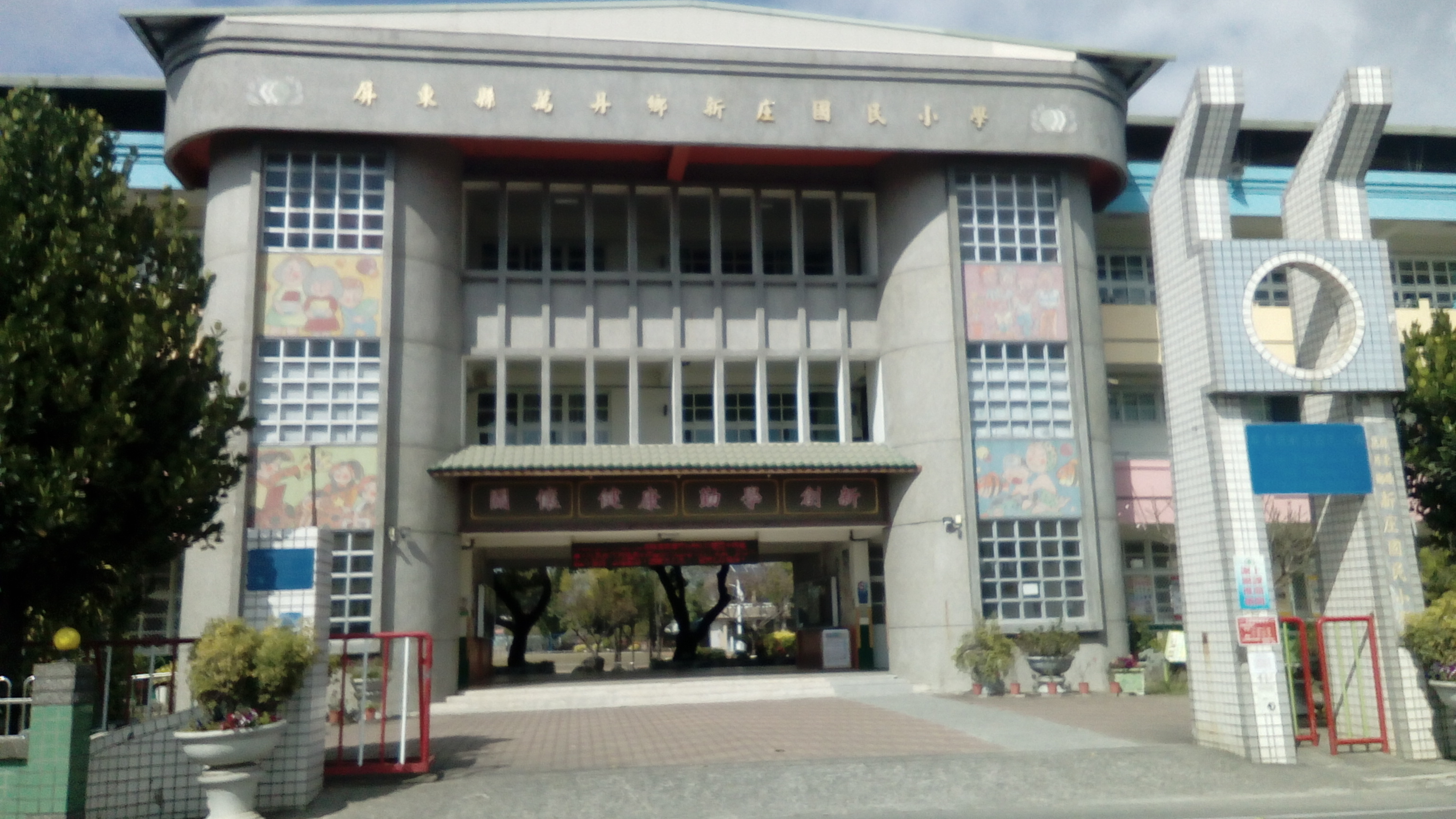 同上 位於萬丹鄉新鐘路